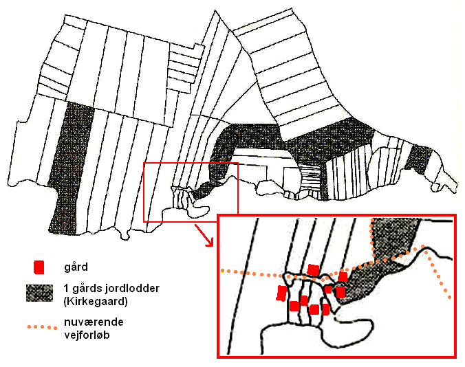 Fløjstrup (Randers Kommune) efter udskriftningen 1793.